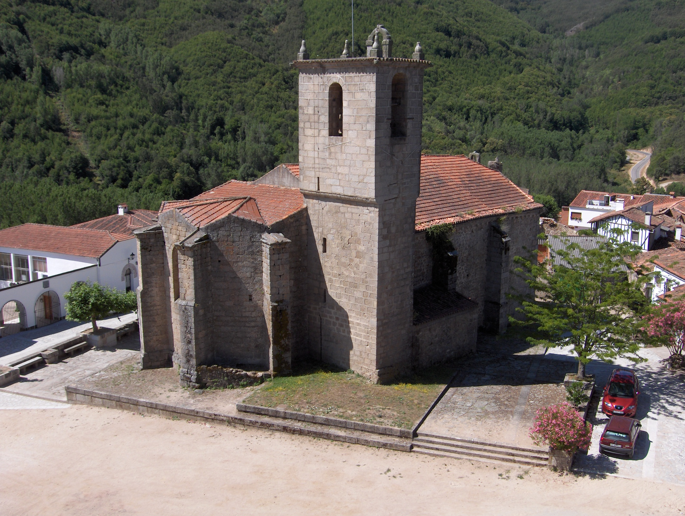 Montemayor del Río - Iglesia de Nuestra Sra de la Asunción